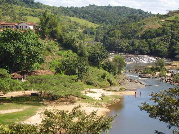 Este é o Balneário Benedito Martins Leite, situado na cidade de Santo Antônio do Rio Abaixo